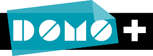 Logo kanału domo+ (2011)